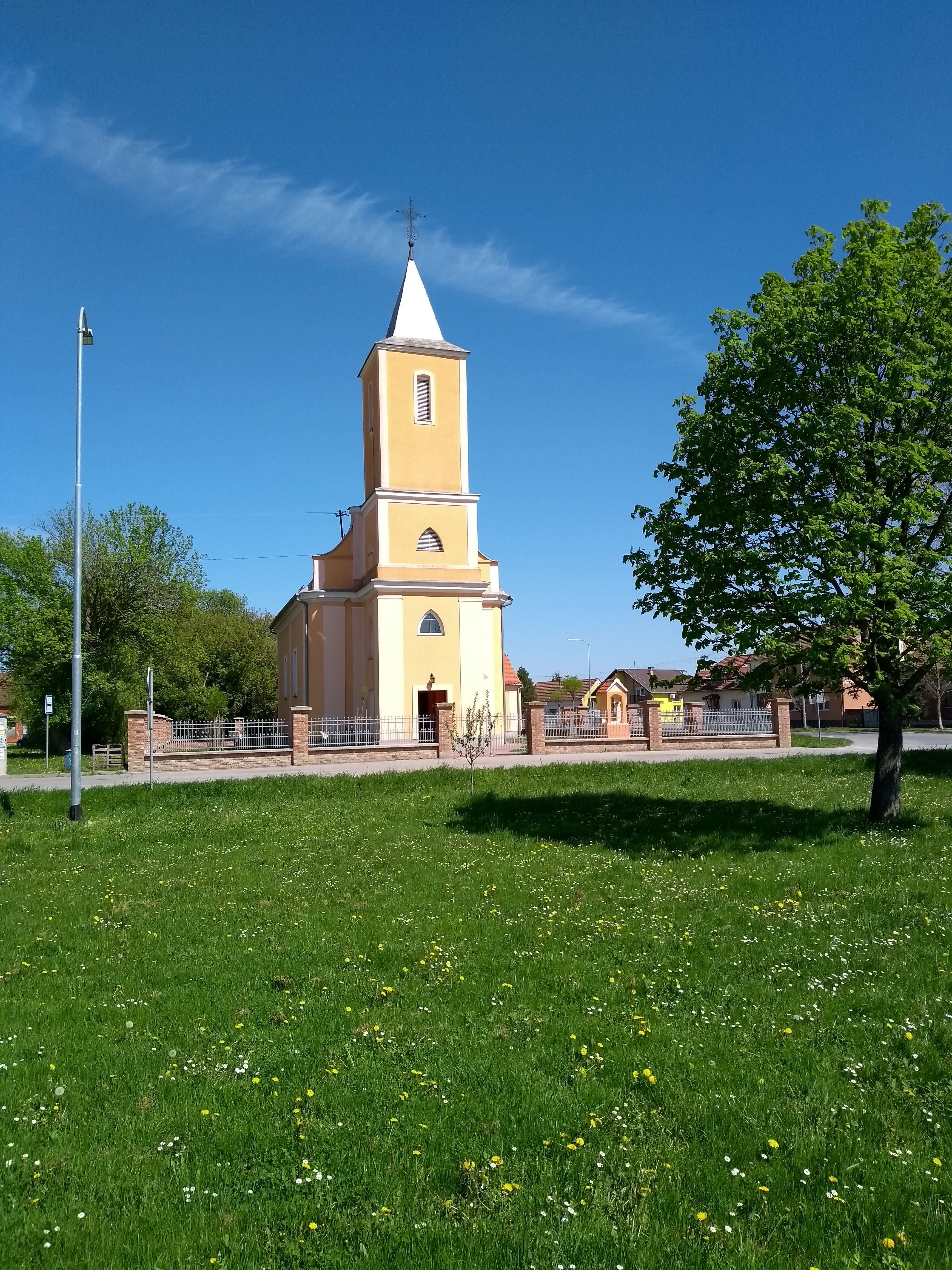 Crkva Svetog Nikole u Budrovcima